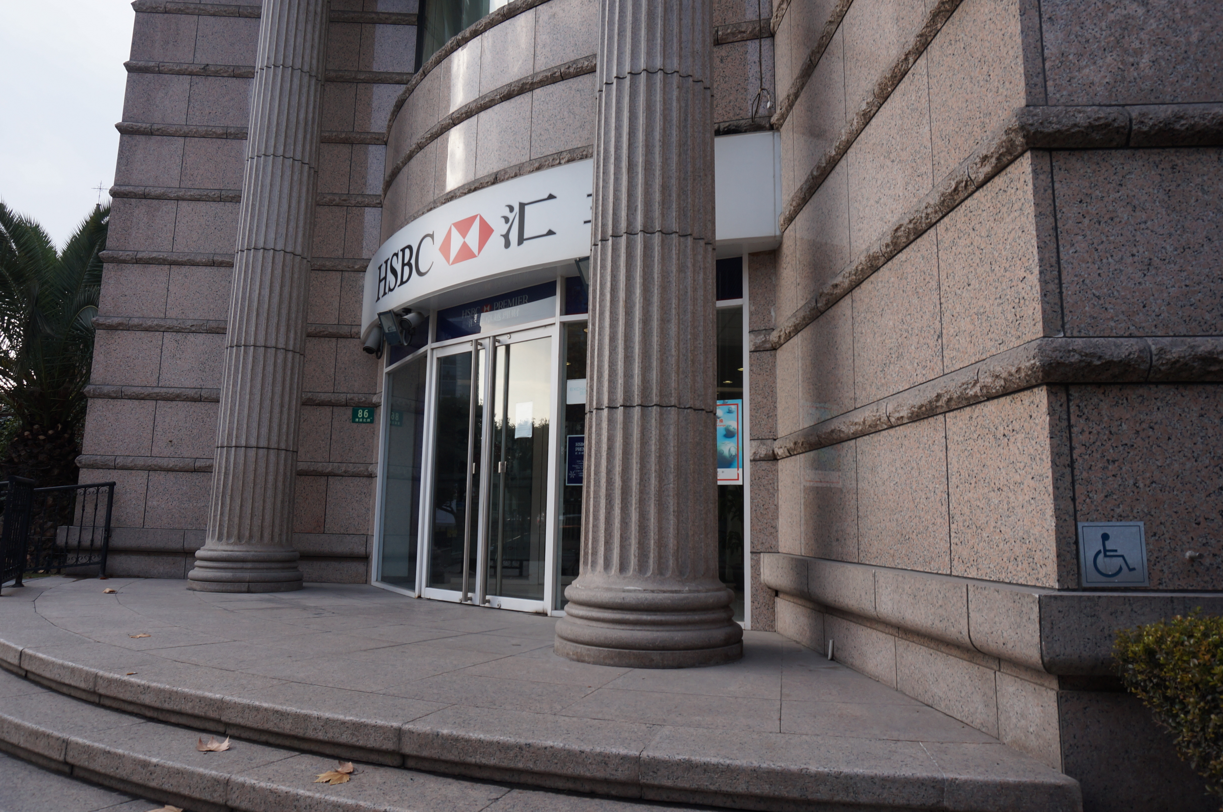 中文（中国大陆）: 汇丰银行漕溪路支行